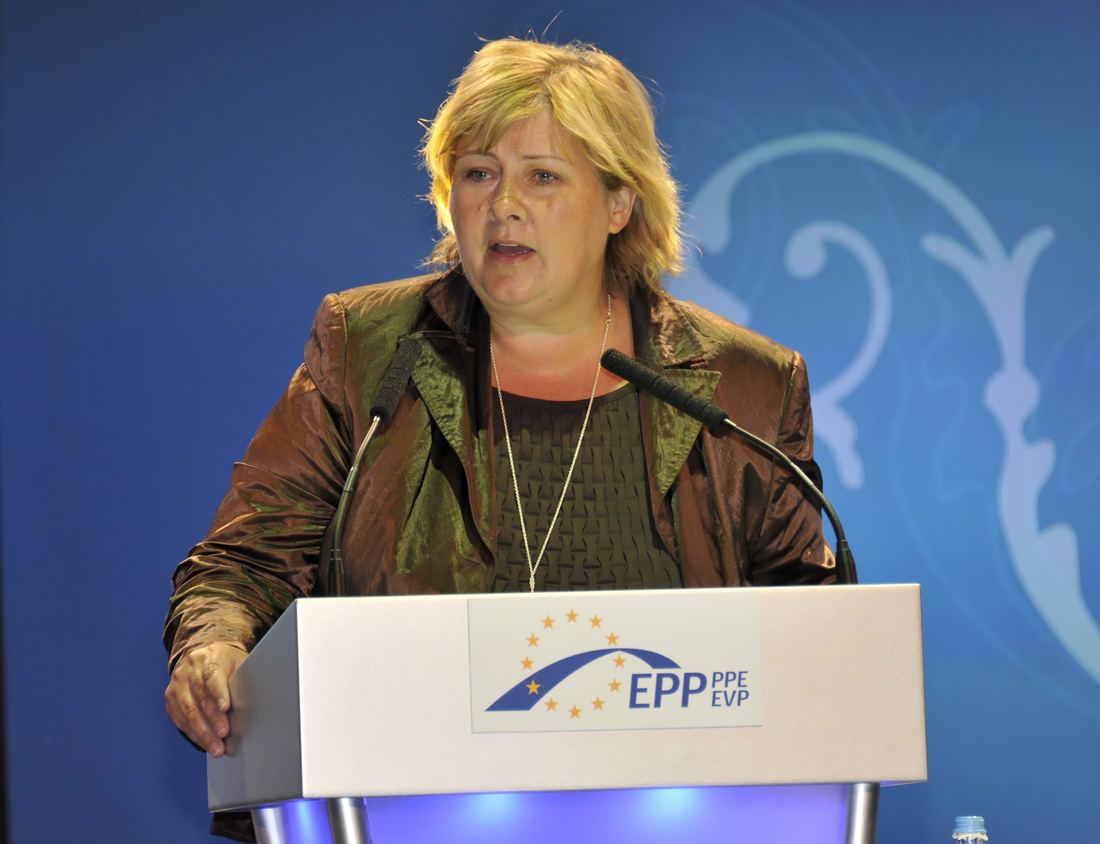 Erna Solberg, EPP Congress Warsaw